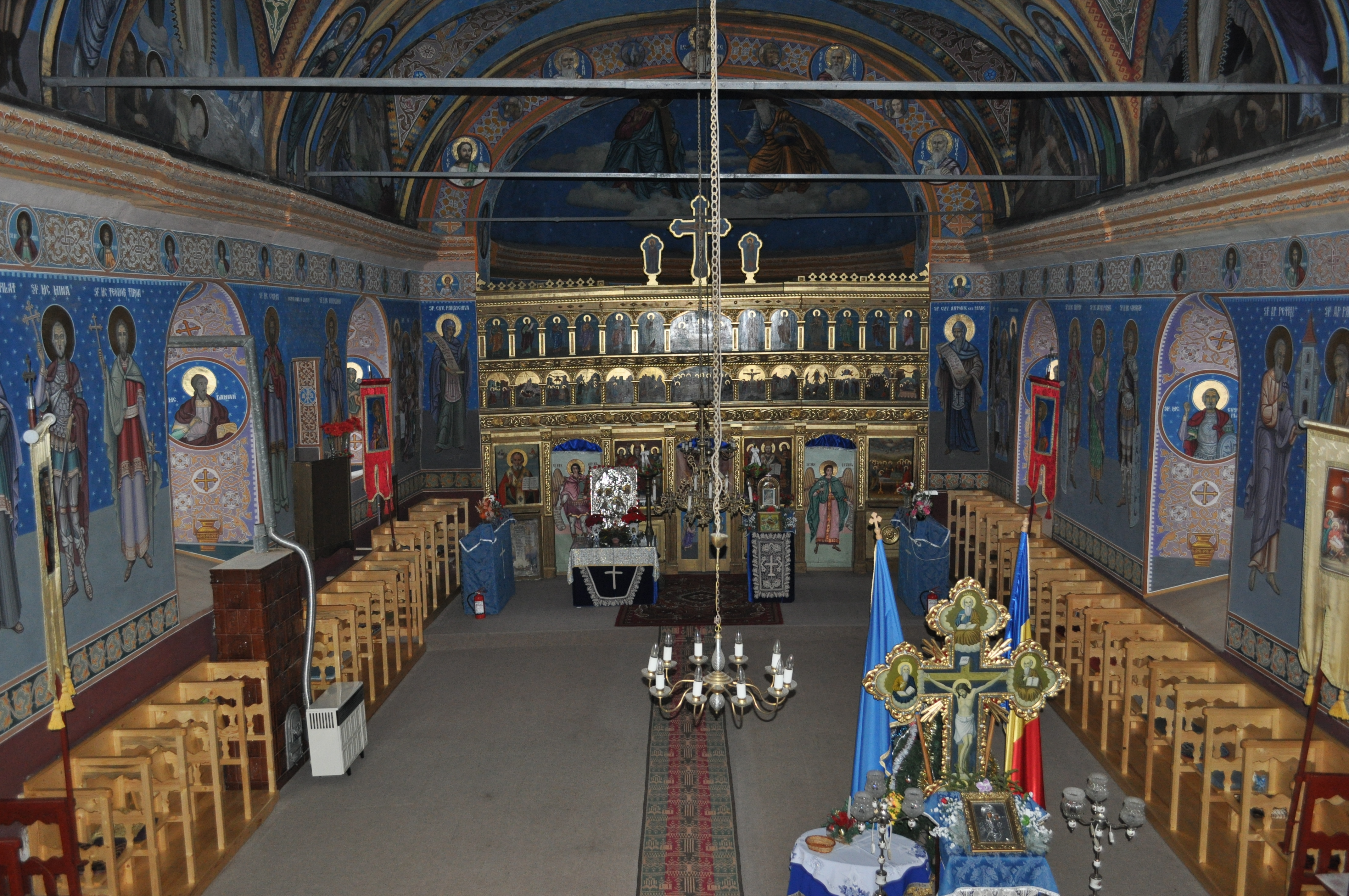 Biserica "Sfânta Maria" din Bungard, județul Sibiu 01